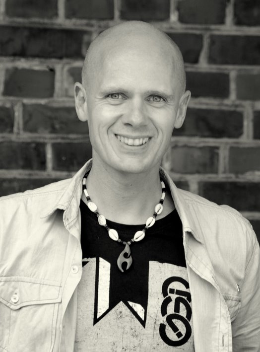 Bilde av forfatter Frode Eie Larsen, tatt av Myriam H. BjerkliDepicted person: Frode Eie Larsen – Norwegian crime fiction writer